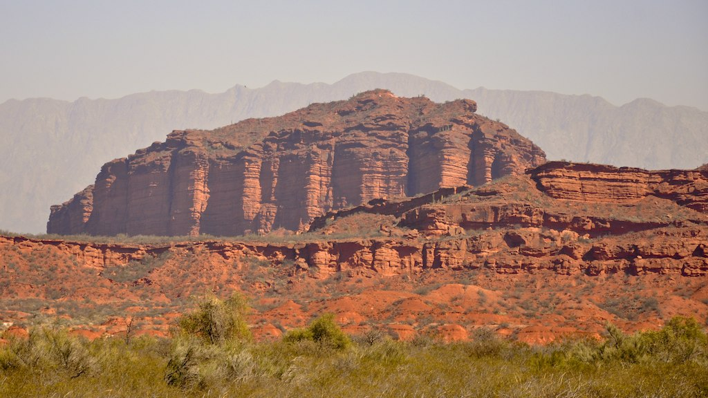 Los Colorados massif, La Rioja Province, Argentina.